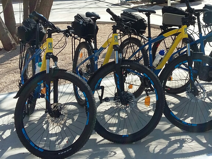 Los Agentes de Movilidad estrenan motos. Se trata de 27 unidades de tres ruedas MP3, marca Piaggio, con las que empezarán a realizar su trabajo en los próximos días. La dirección general de Gestión y Vigilancia de la Circulación, del Área de Medio Ambiente y Movilidad, está llevando a cabo una renovación de los vehículos destinados a este cuerpo, algunos de los cuales tienen más de 10 años.